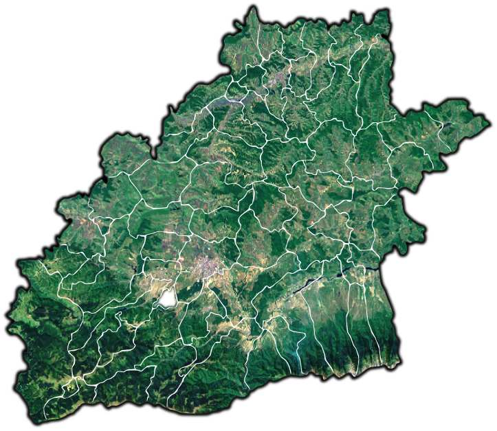 Poplaca jud Sibiu